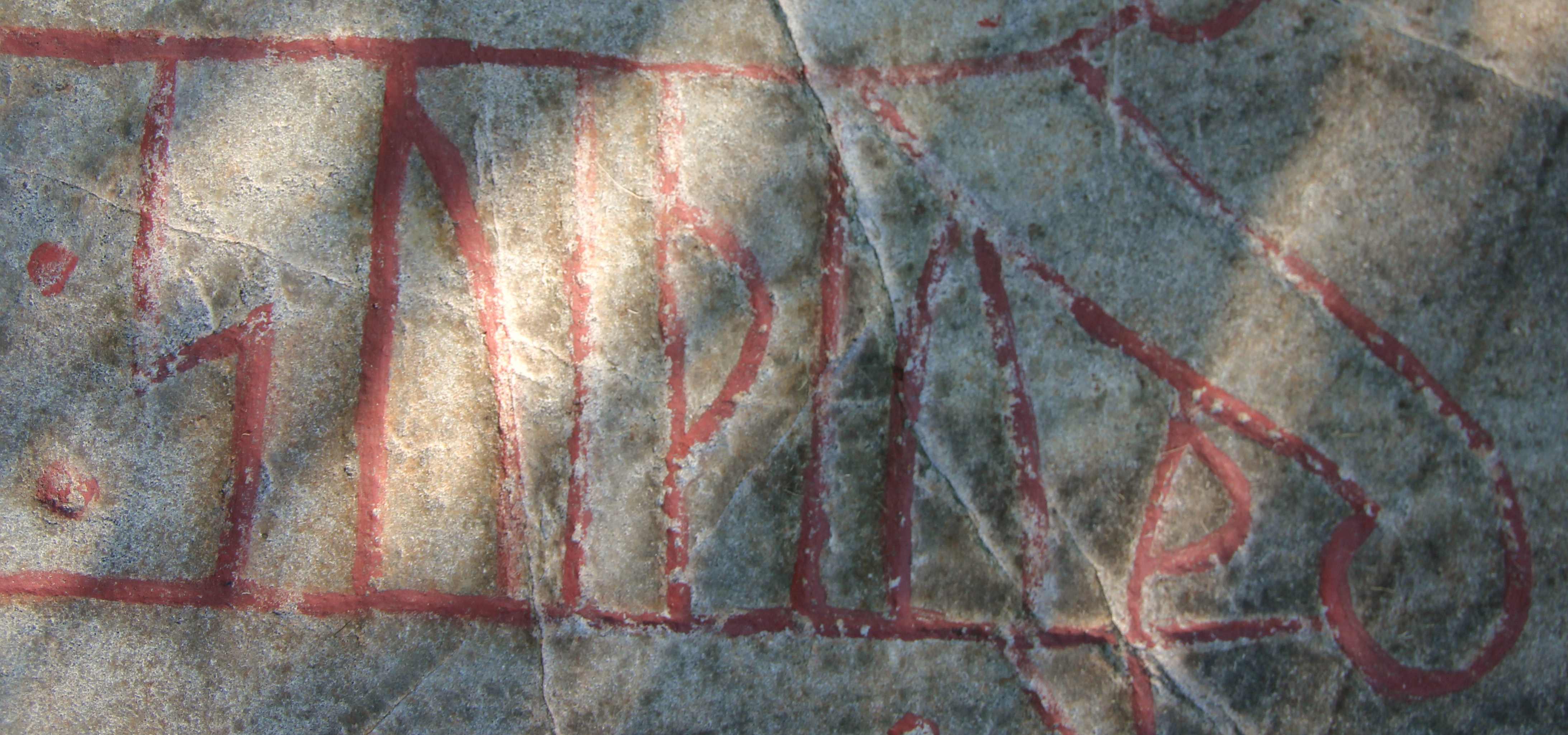 Runstenen Sö Fv1948;289 vid Aspa bro i Ludgo socken, Nyköping. Namnet "Svitjod" (suiþiuþ) nämns på stenen.